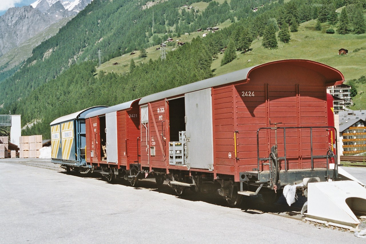 BVZ-Güterwagen Gb 2424 und 2421 in Zermatt